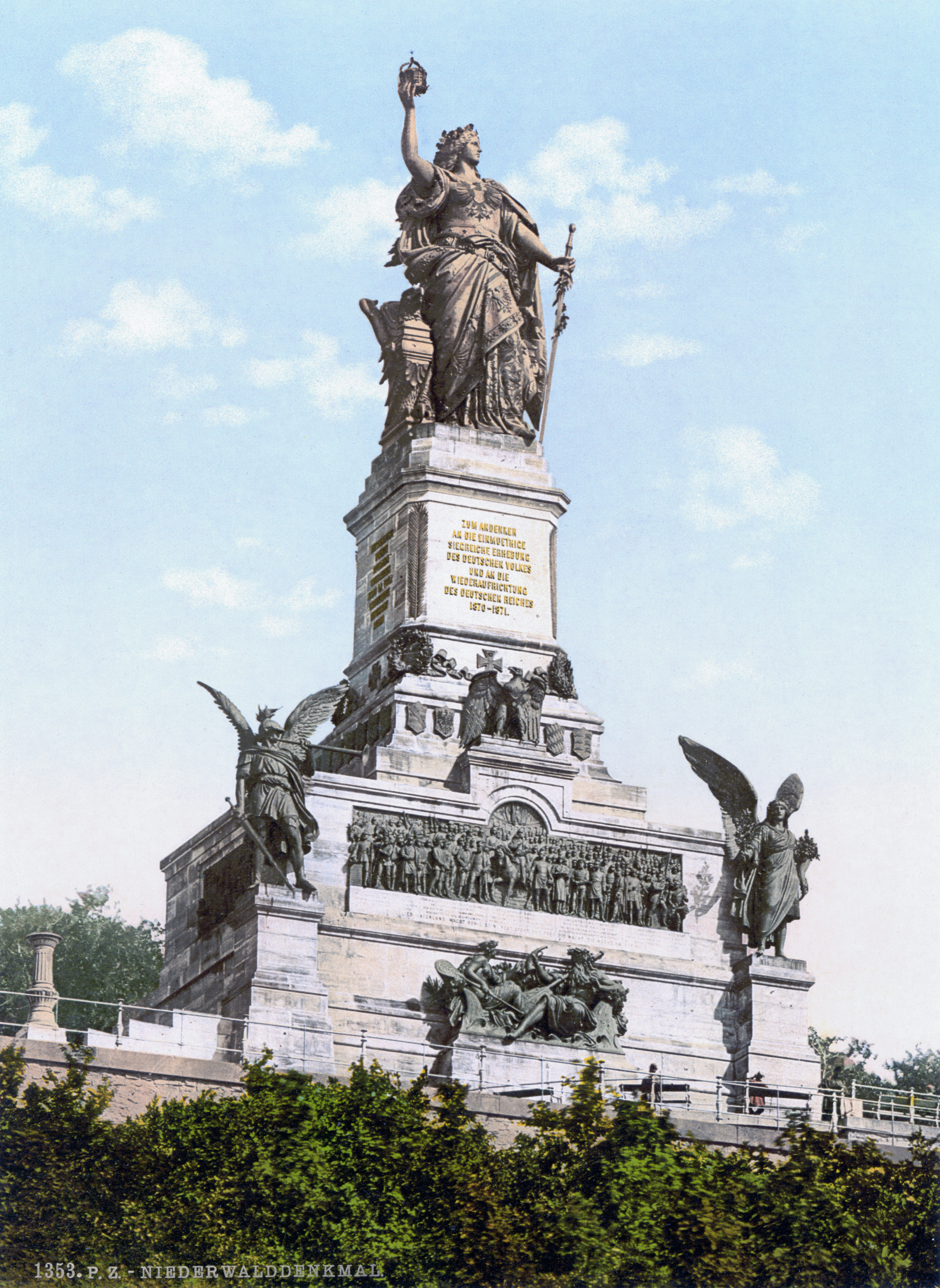 Niederwalddenkmal